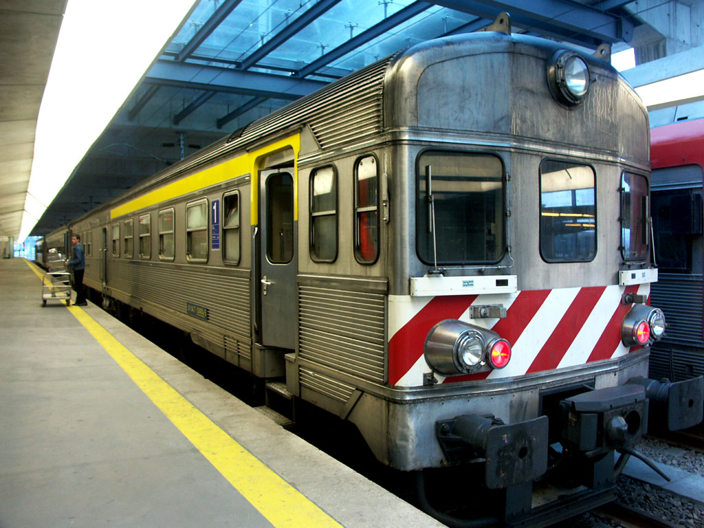 o comboio das 7h26. Tipo: Comboio InterRegional 861 [Porto • Campanhã - Pocinho] Local: Estação de Porto • Campanhã [Linha do Minho, PK 0,0 • Linha do Norte, PK 336] Data e hora: 19 de Agosto de 2006 [7h22] Material: Automotora 0614 [Unidade Tripla Diesel]